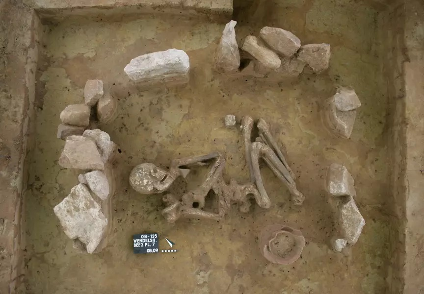 Hockerbestattung mit Steinumstellung aus Wendelsheim, unten rechts der Glockenbecher.